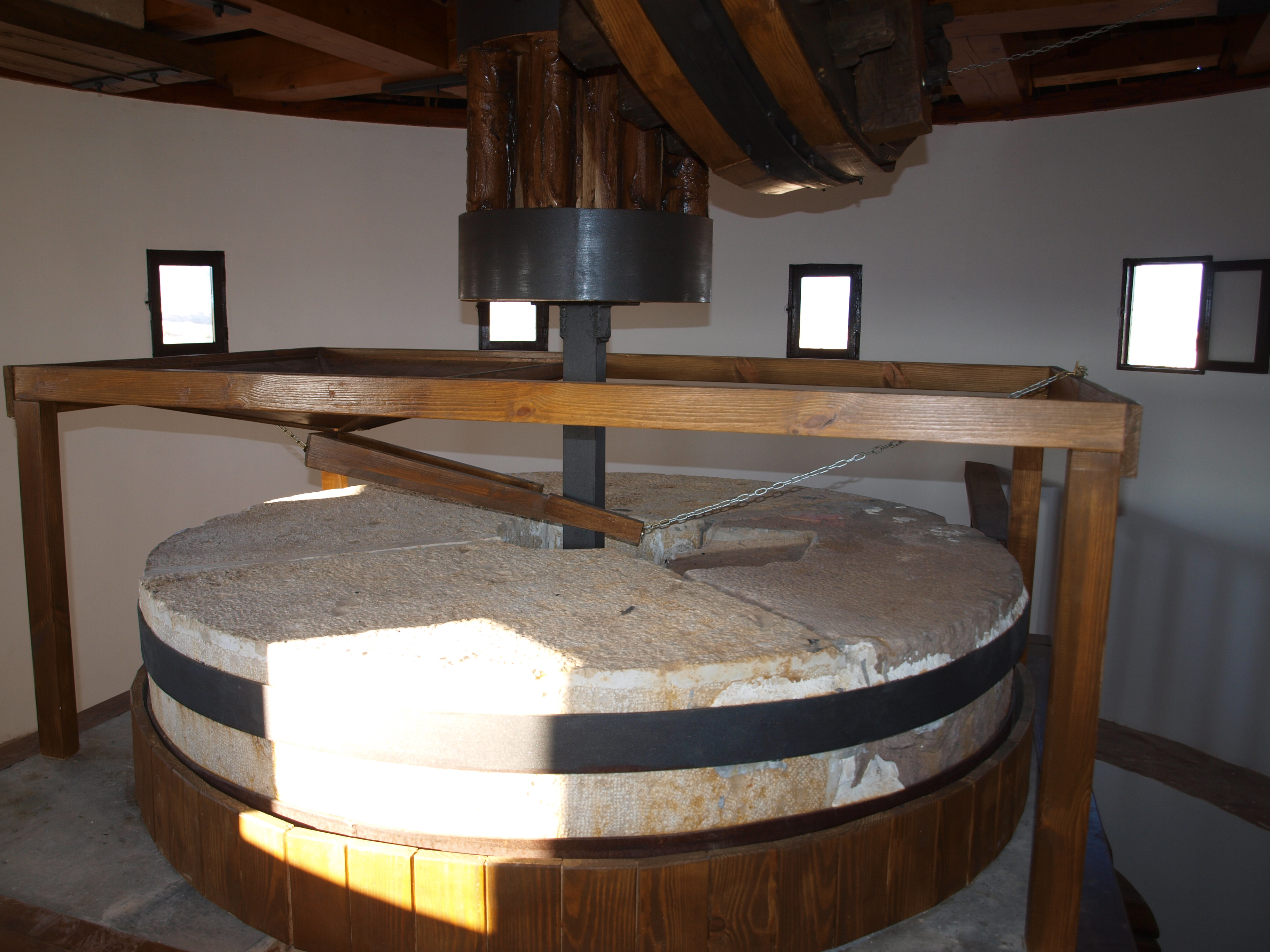 maquinaria para la molienda en el molino de viento de Malanquilla